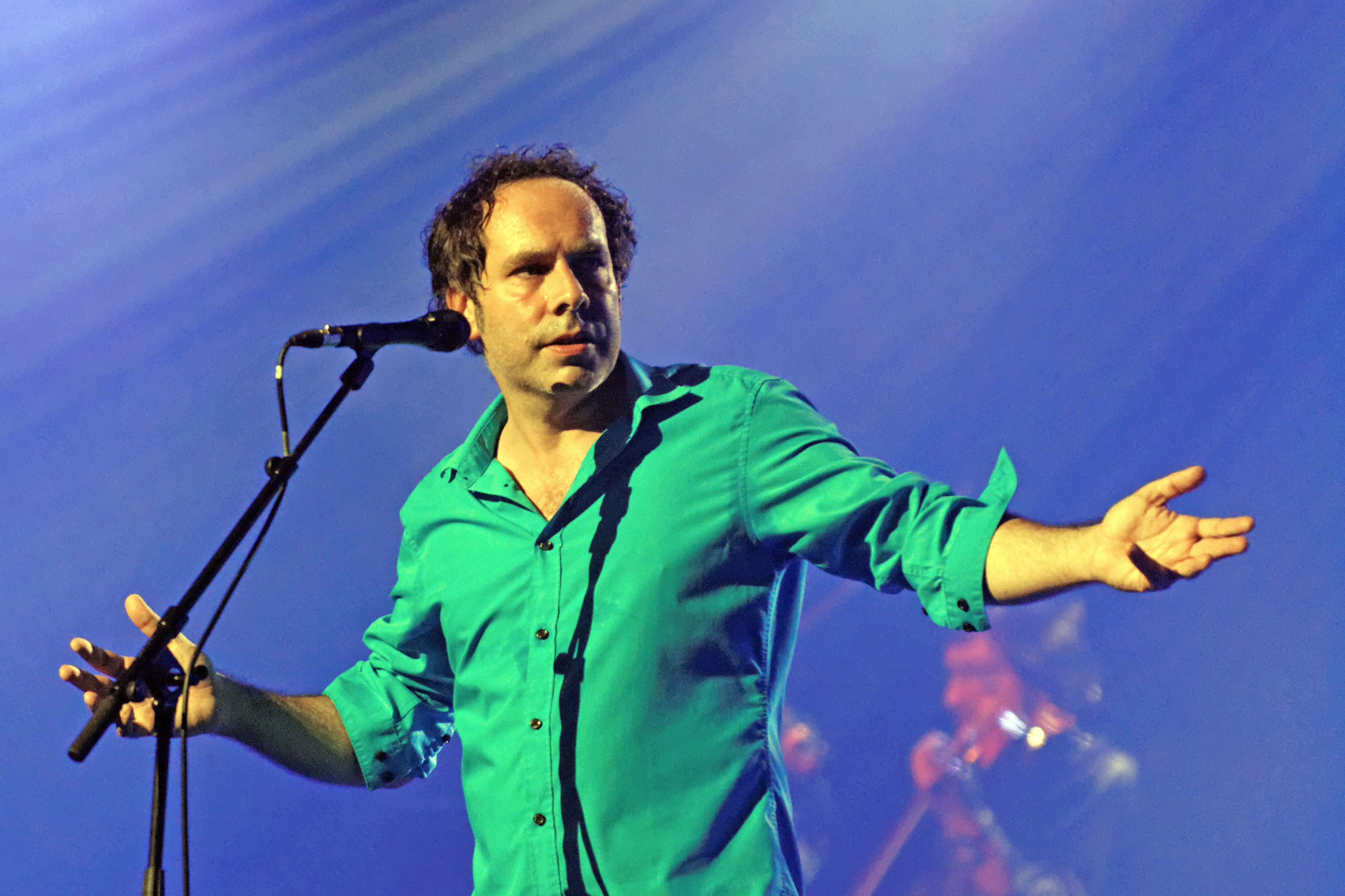 Olli and the Bollywood Orchestra en concert à l'espace Gradlon lors du festival de Cornouaille le 23 juillet 2014.